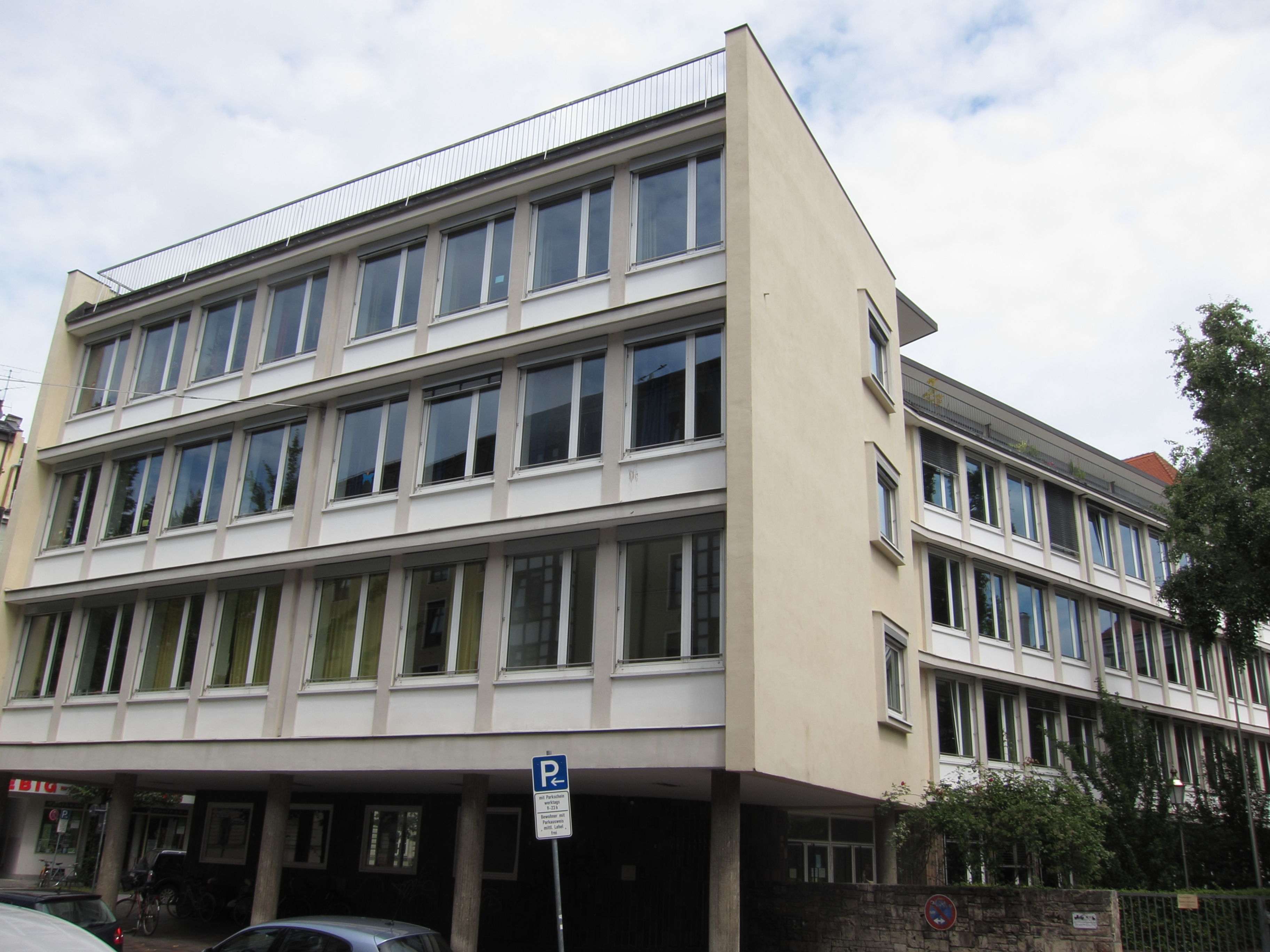 St.-Anna-Straße 22; St.-Anna-Volksschule, differenziert gegliederter Baukörper mit leicht konvex gebogener Front an der Liebigstraße, Stahlbetonskelettbau, teilweise verputzt, mit Flachdächern, 1953-55 von Helmut von Werz und Johann-Christoph Ottow; fünfgeschossiger Klassentrakt, im Westen (zur St.-Anna-Straße) durch niedrigeren, kubischen Kopfbau mit Arkaden abgeschlossen.